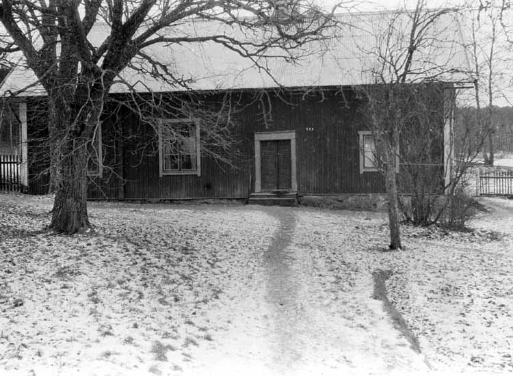 Äldsta Aspnässkolan i Jakobsberg i Järfälla. Skolan låg vid korsningen Allévägen-Enköpingsvägen, allmänt kallat Aspnäs vägskäl. Bildnr 01360.